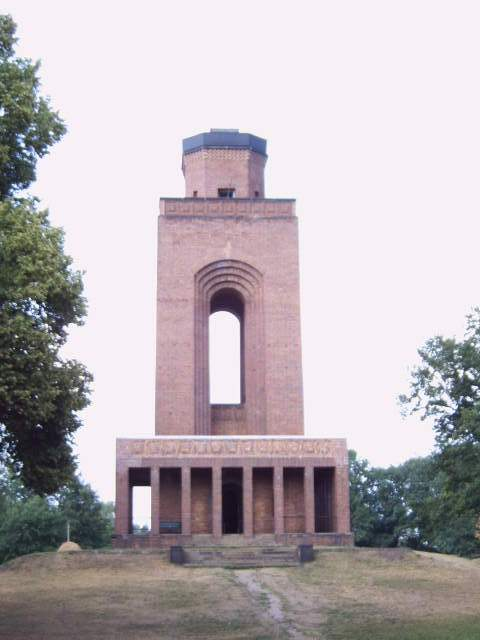 Bismarckturm in Burg Spreewald, Land Brandenburg, Deutschland Bild aufgenomman am 28.6.2006 von Olaf Meister